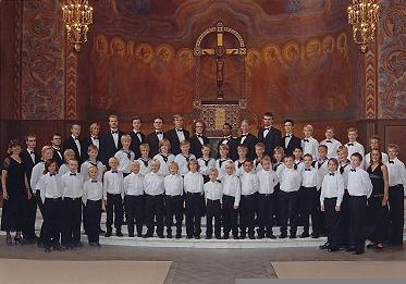 GoteborgsGosskor